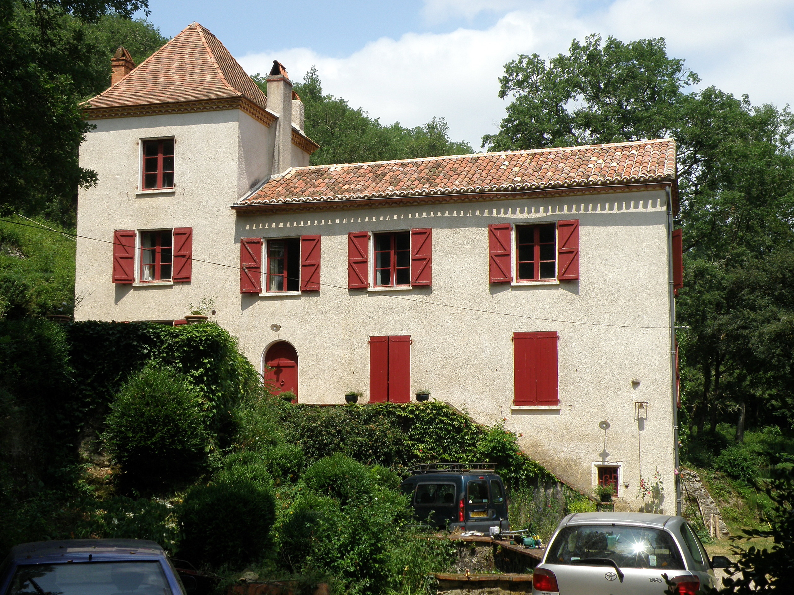 Le moulin de Nouaillac, sur le rau de Nouaillac, affluent du Lot, dans l'extrême est de la commune de Lamagdelaine, dép. du Lot (région Midi-Pyrénées, France).